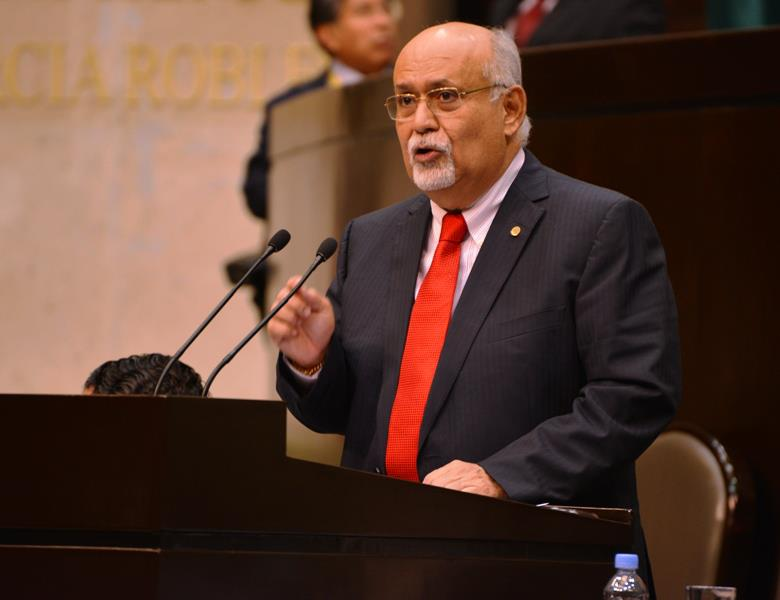 Diputado en tribuna